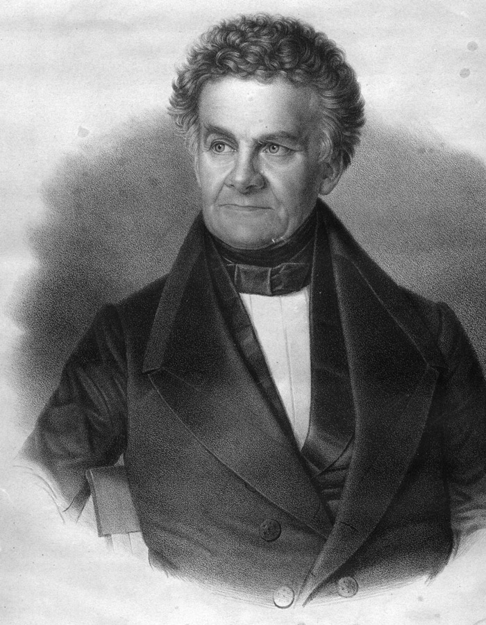 Lithographie Johann Friedrich Danneil von C. F. Schreck